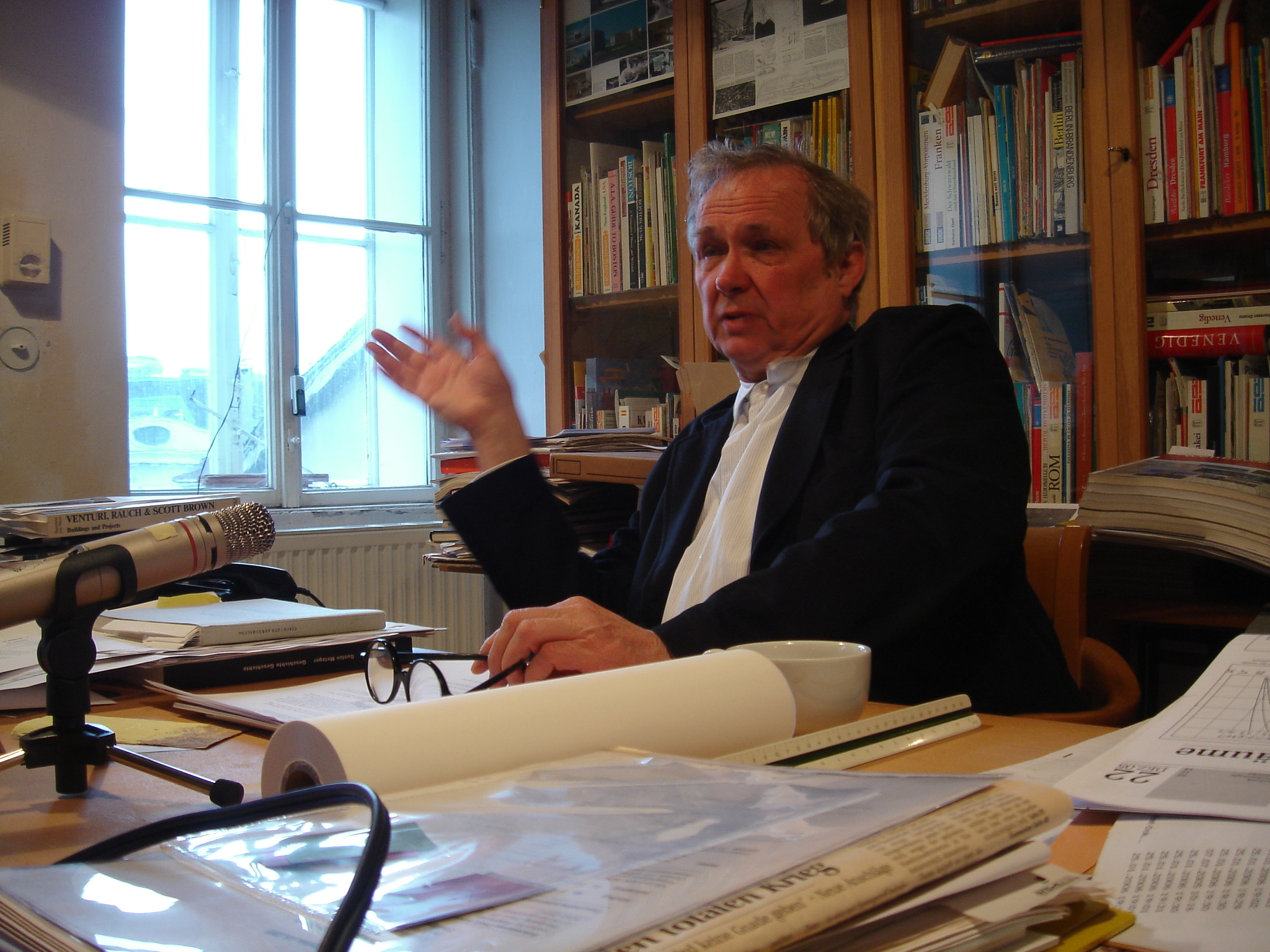 Hermann Czech in seinem Atelier Bild darf selbstverständlich weiterverwendet werden, wenn der Autor genannt wird.